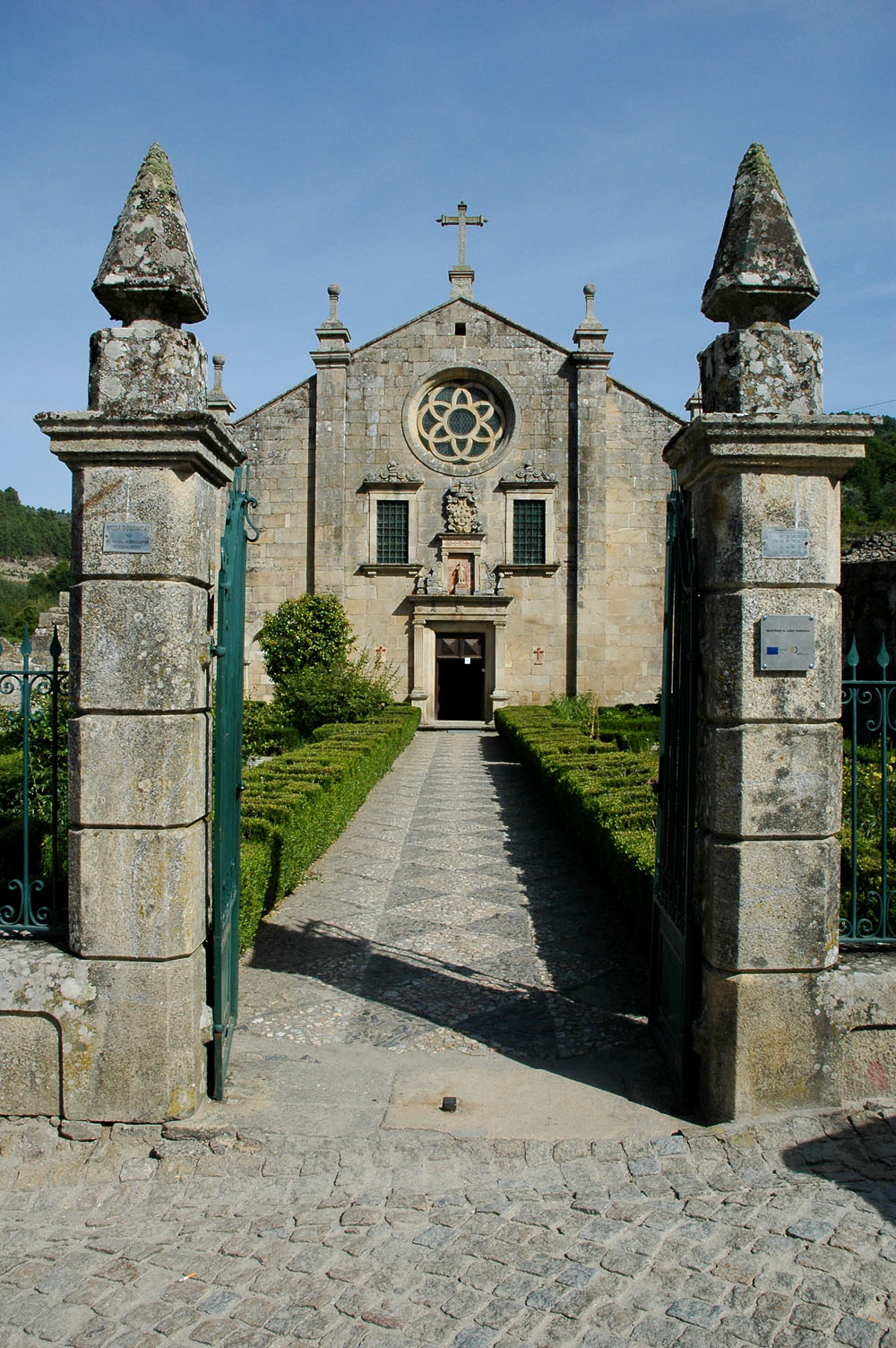 Convento de São João de Tarouca, localizado na encosta da Serra de Leomil, no distrito de Viseu